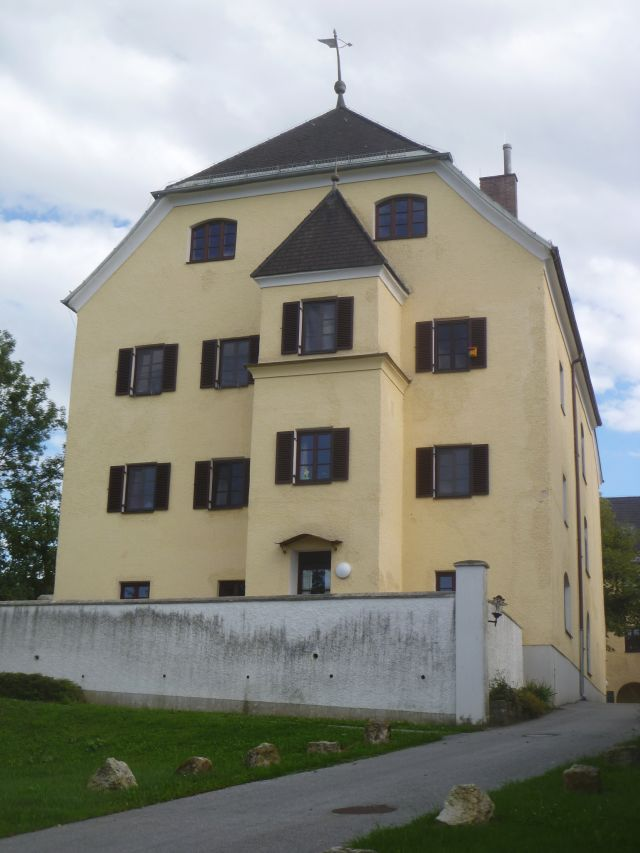 Schloss_Neuhaus_Eingangsgebäude